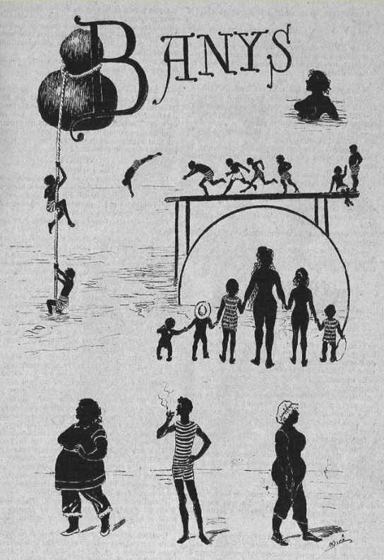 Página de la revista La Campana de Gràcia